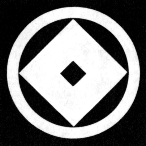 丸に釘抜